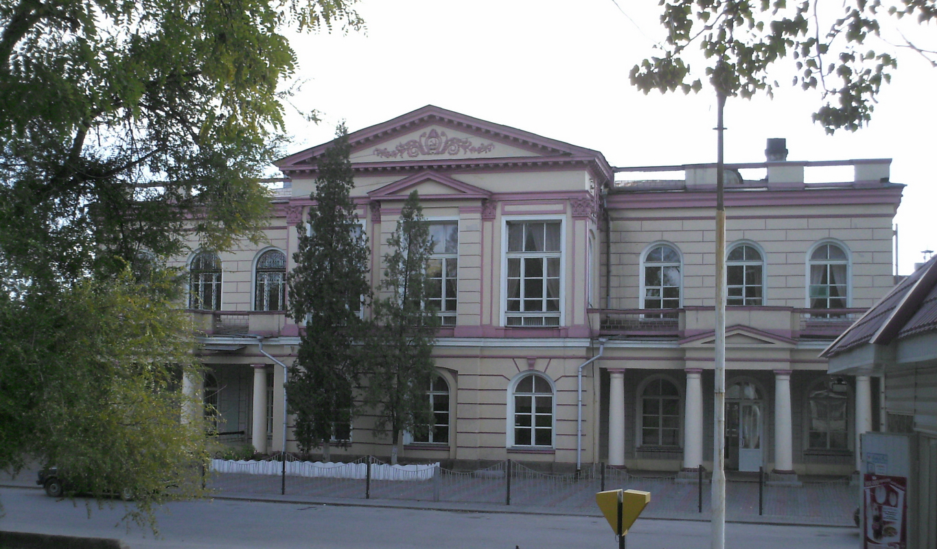 в Новочеркасске